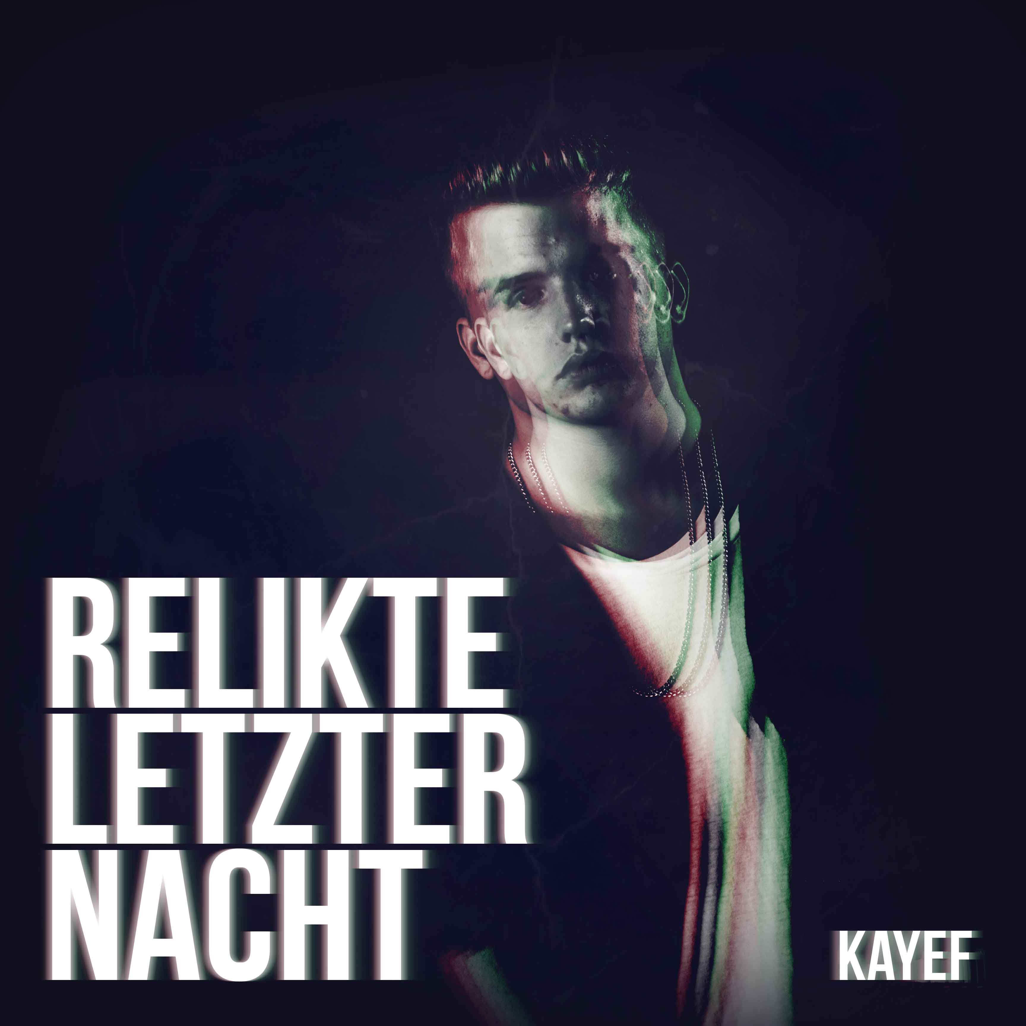 Cover der Single „Relikte letzter Nacht“